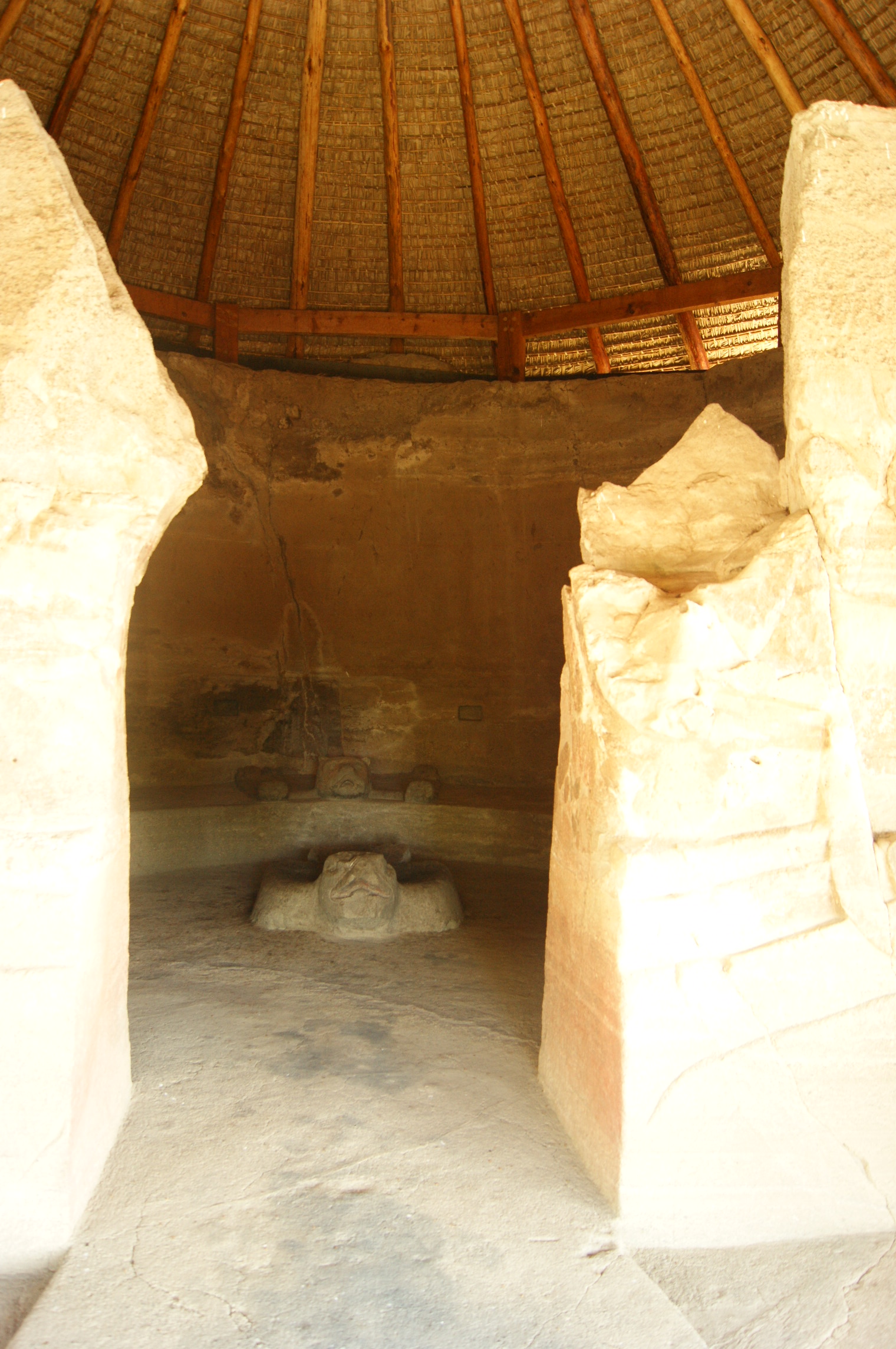 Malinalco